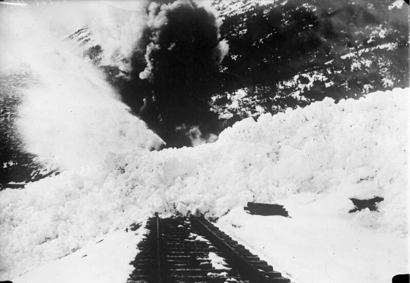 Lebensgefahr im Hochgebirge Durch eine Lawine vollständig verschüttete Eisenbahnstrecke in der Schweiz, durch welche der Verkehr tagelang unterbrochen war.